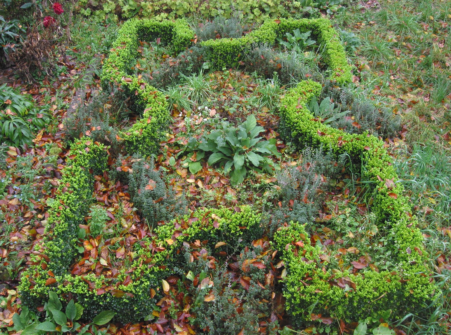 Knooptuin met Teucrium chamaedrys subsp. germanicum en Buxus sempervirens